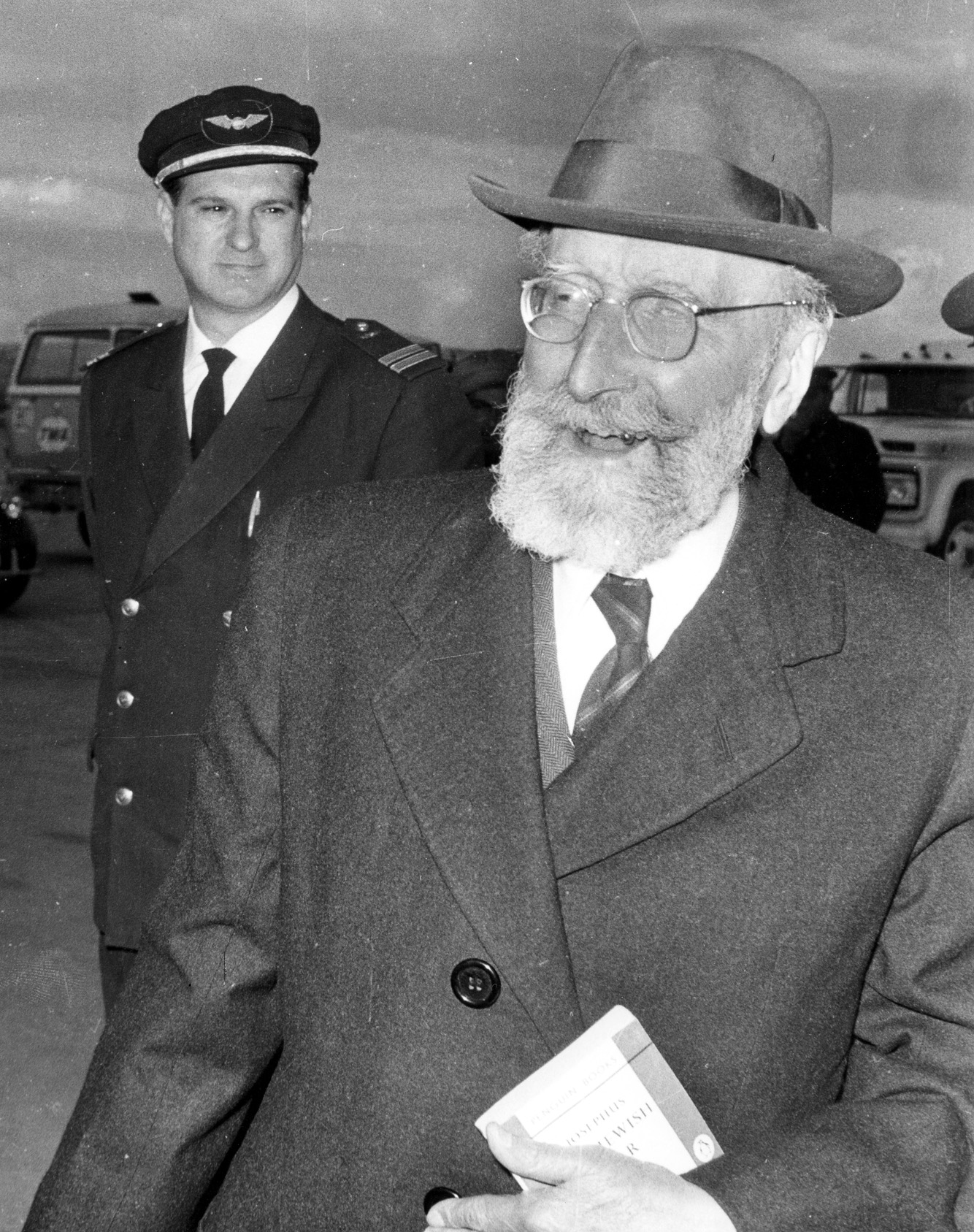 Menéndez Pidal llega a Barajas desde Tel Aviv.